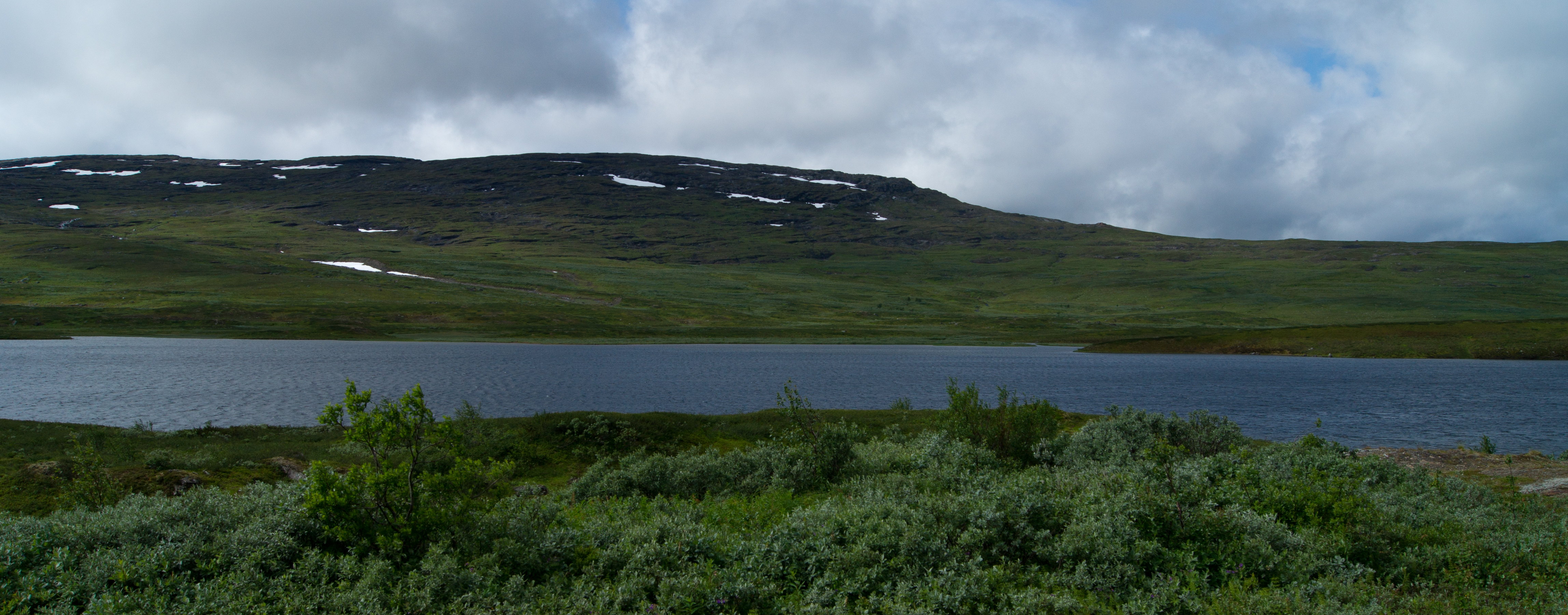 Le Guoletisjavrre, un lac dans le nord de la Suède.